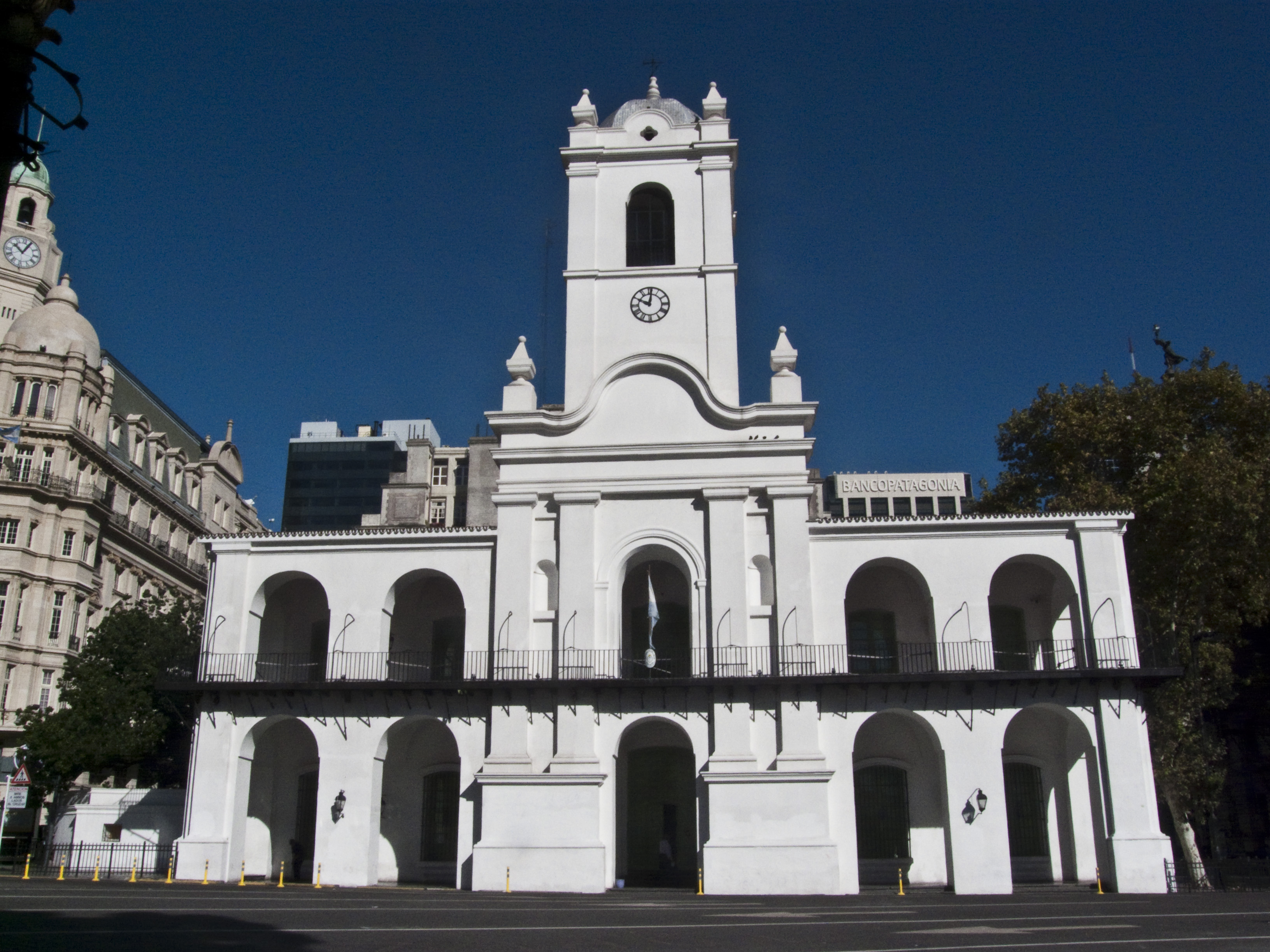 Cabildo de la Ciudad de Buenos Aires